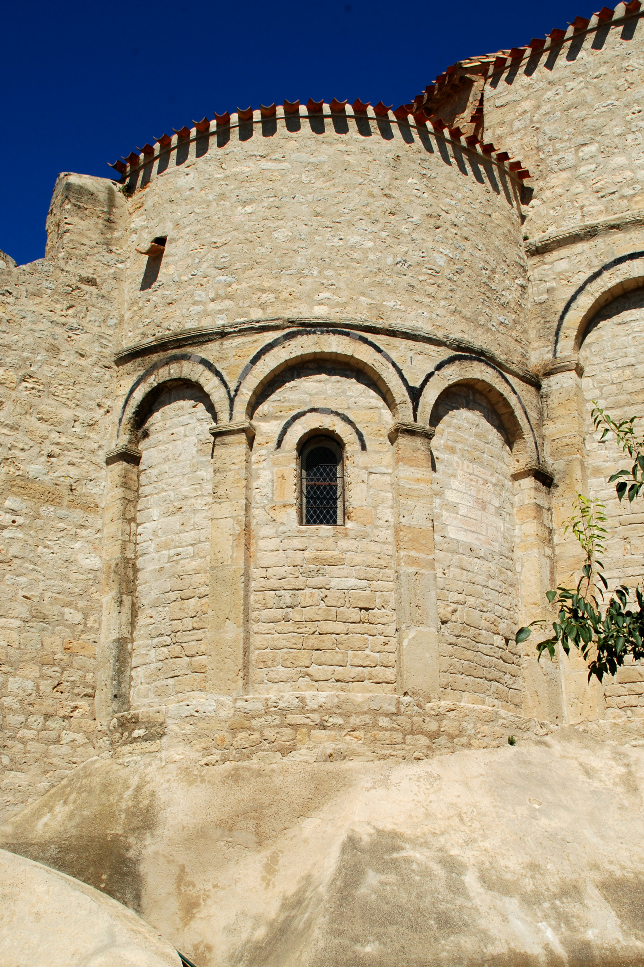 France - Languedoc - Aude - Église Saint-Jean l’Évangéliste d'Ouveillan